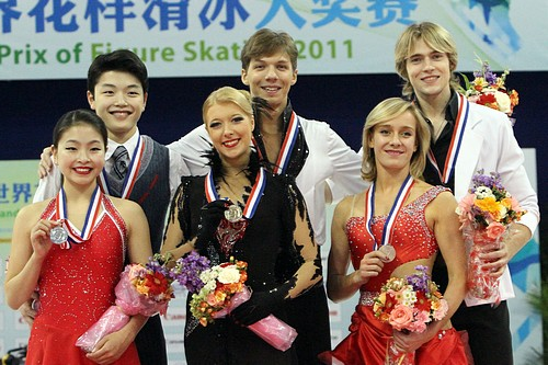 Подиум в танцах на льду на Кубке Китая 2011. Слева на право: Майя Шибутани / Алекс Шибутани (2-е место), Екатерина Боброва / Дмитрий Соловьёв (1-е место), Пернель Каррон / Ллойд Джонс (3-е место)